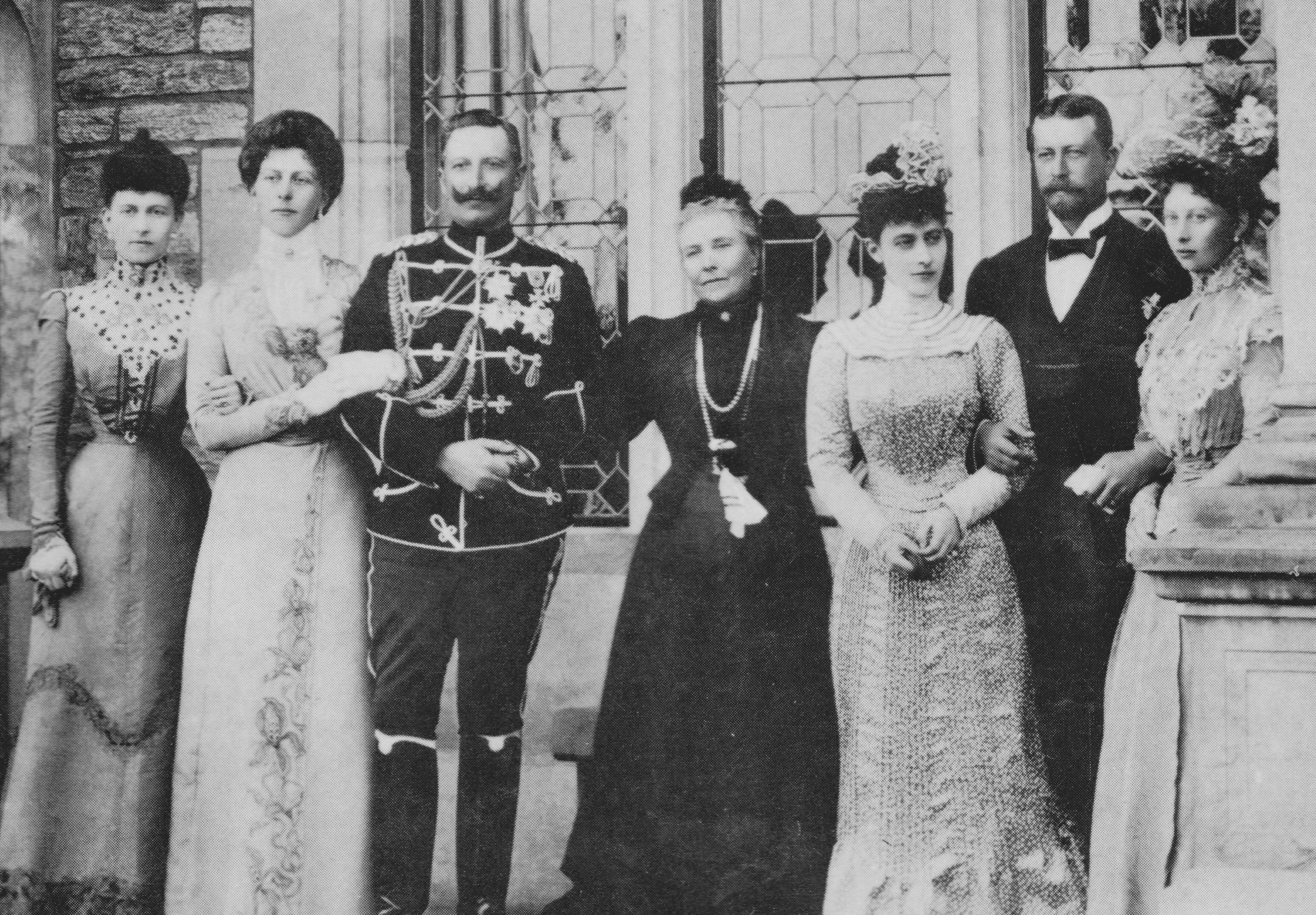 Kaiserin Friedrich auf Schloss Friedrichshof, Familientreffen links: der neue Kaiser Wilhelm II, rechts sein Bruder Prinz Heinrich von Preußen